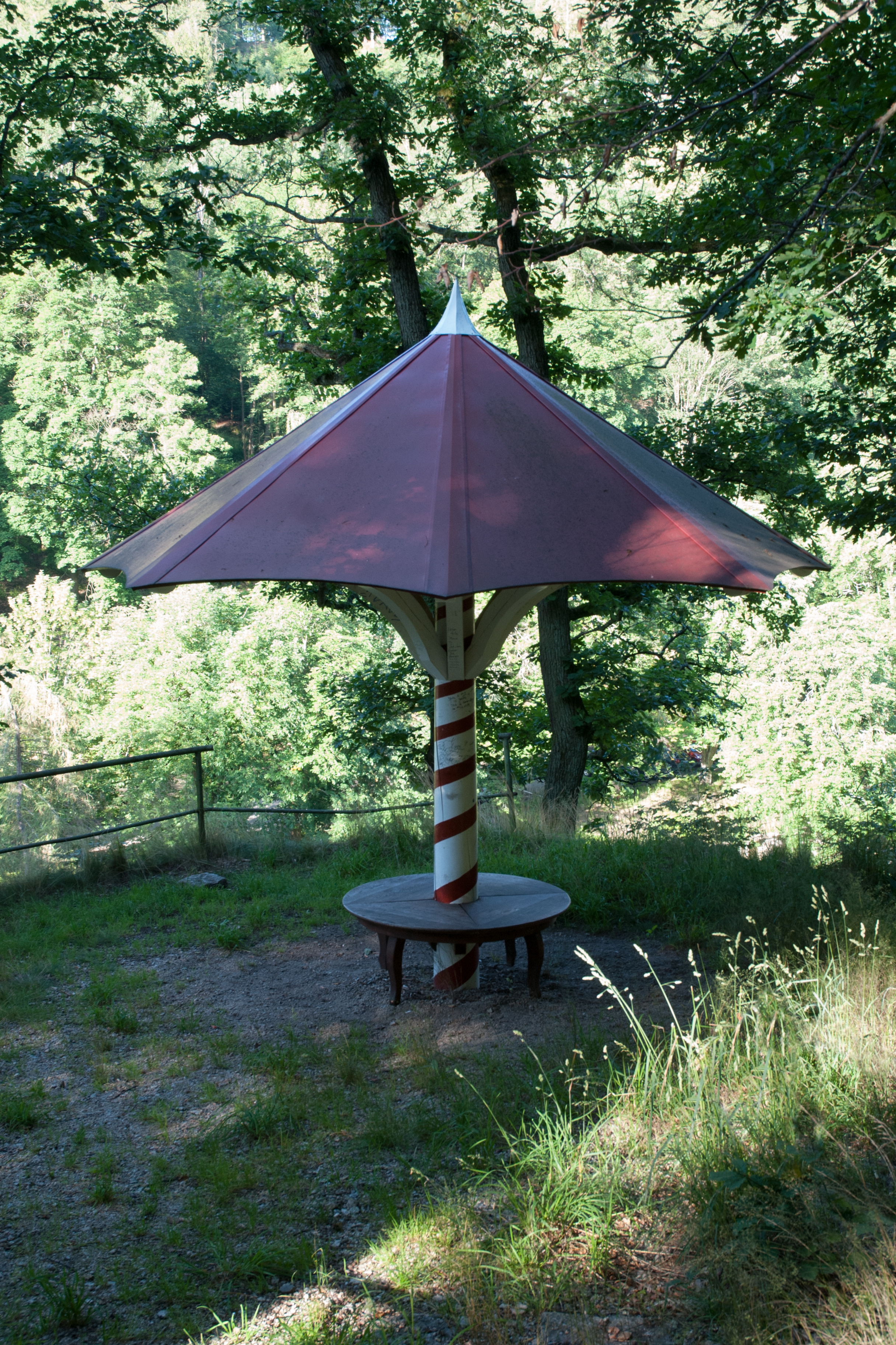 Přístřešek nad Slovenskou ulicí a řekou Teplá v Karlových Varech